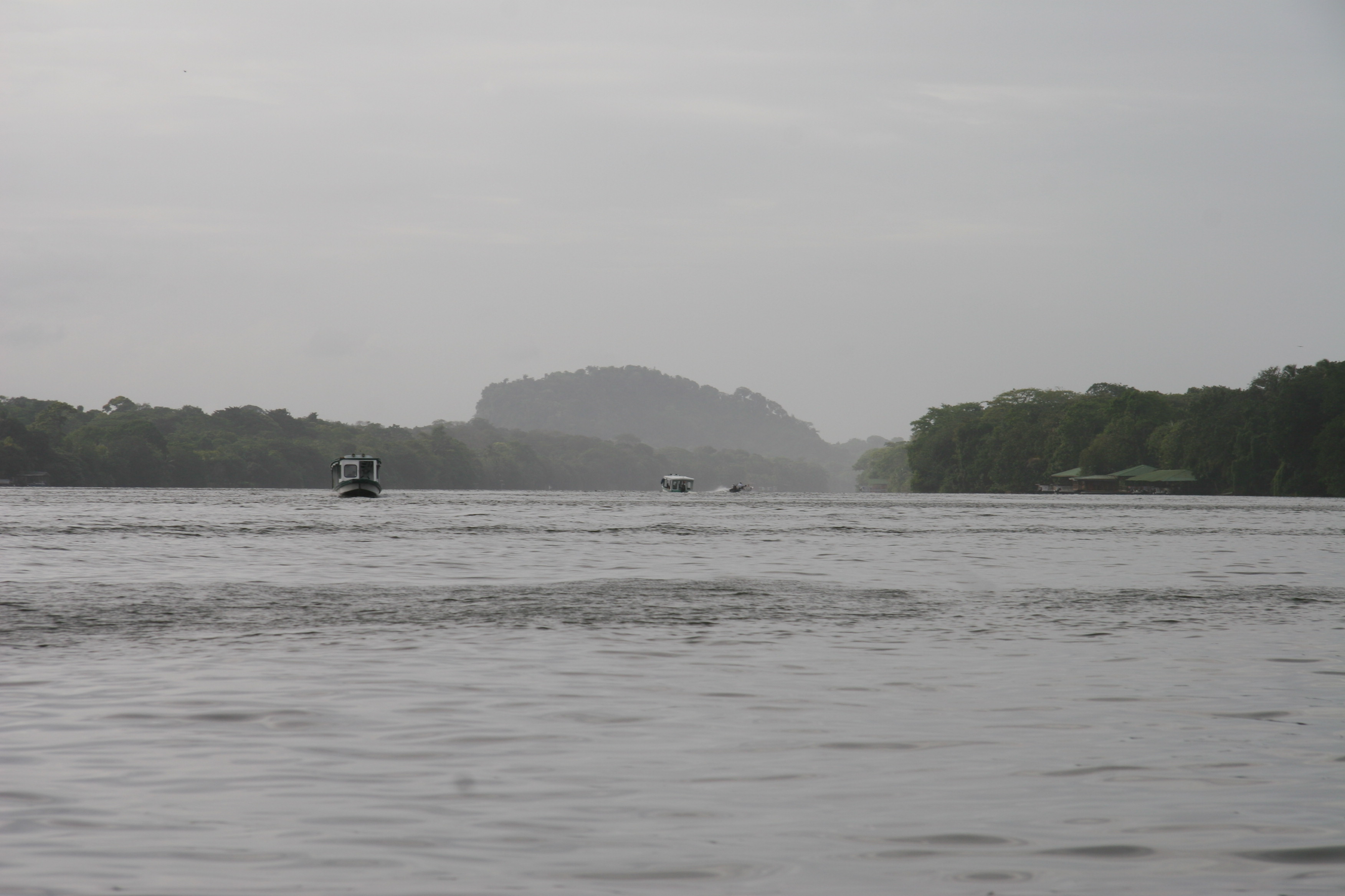 Tortuguero river